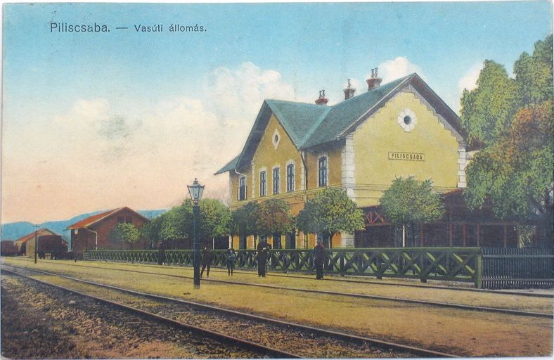 Piliscsabai vasútállomás régi képeslapon